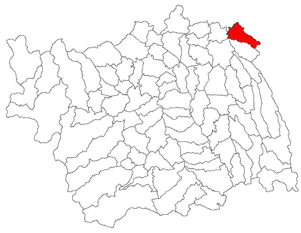 Categorie:Hărţi ale judeţului Bacău